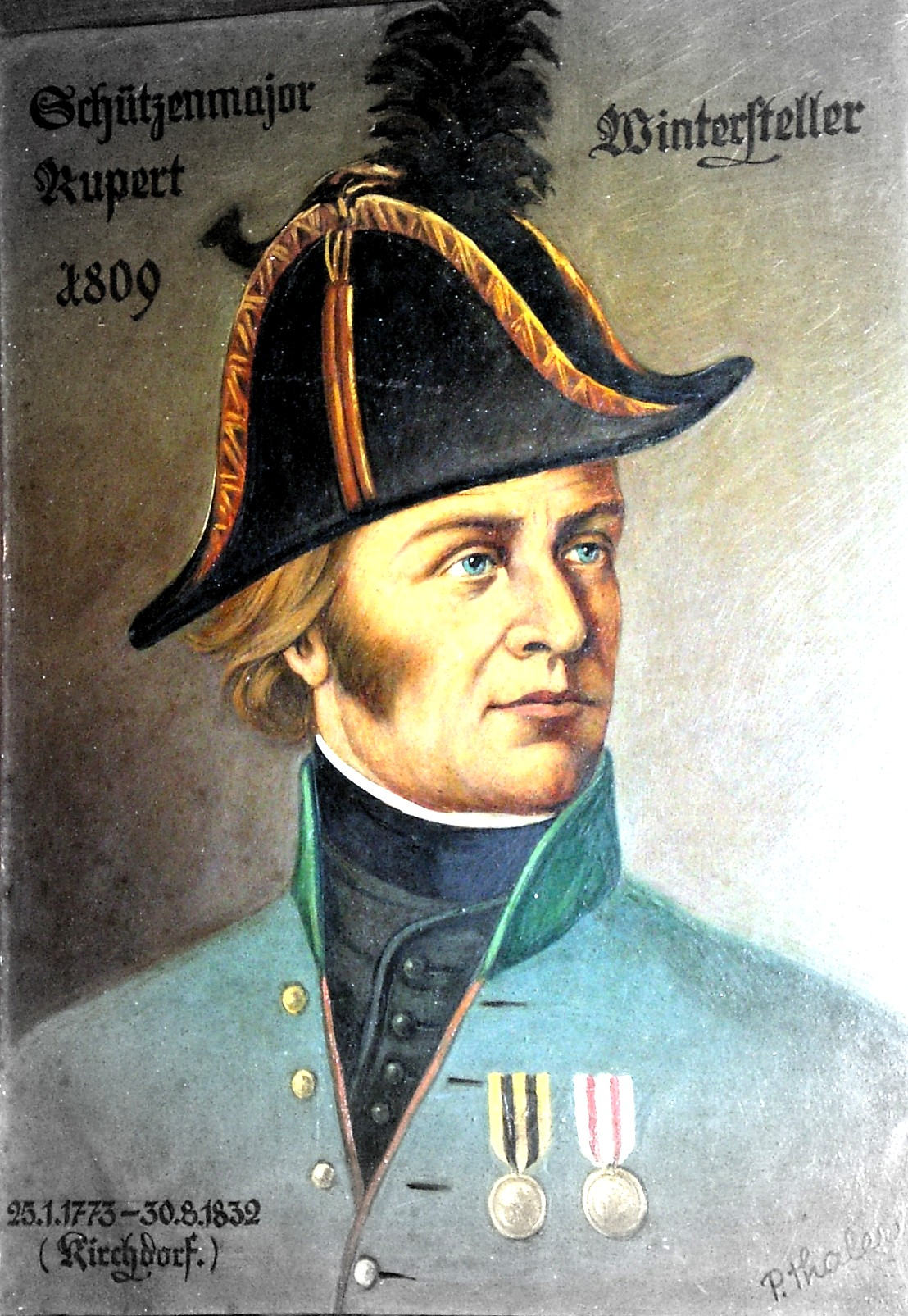 Kopie, Peter Thaler - St.Johann i.T., eines zeitgenössischen, verschollenen Portraits (Künstler unbekannt)